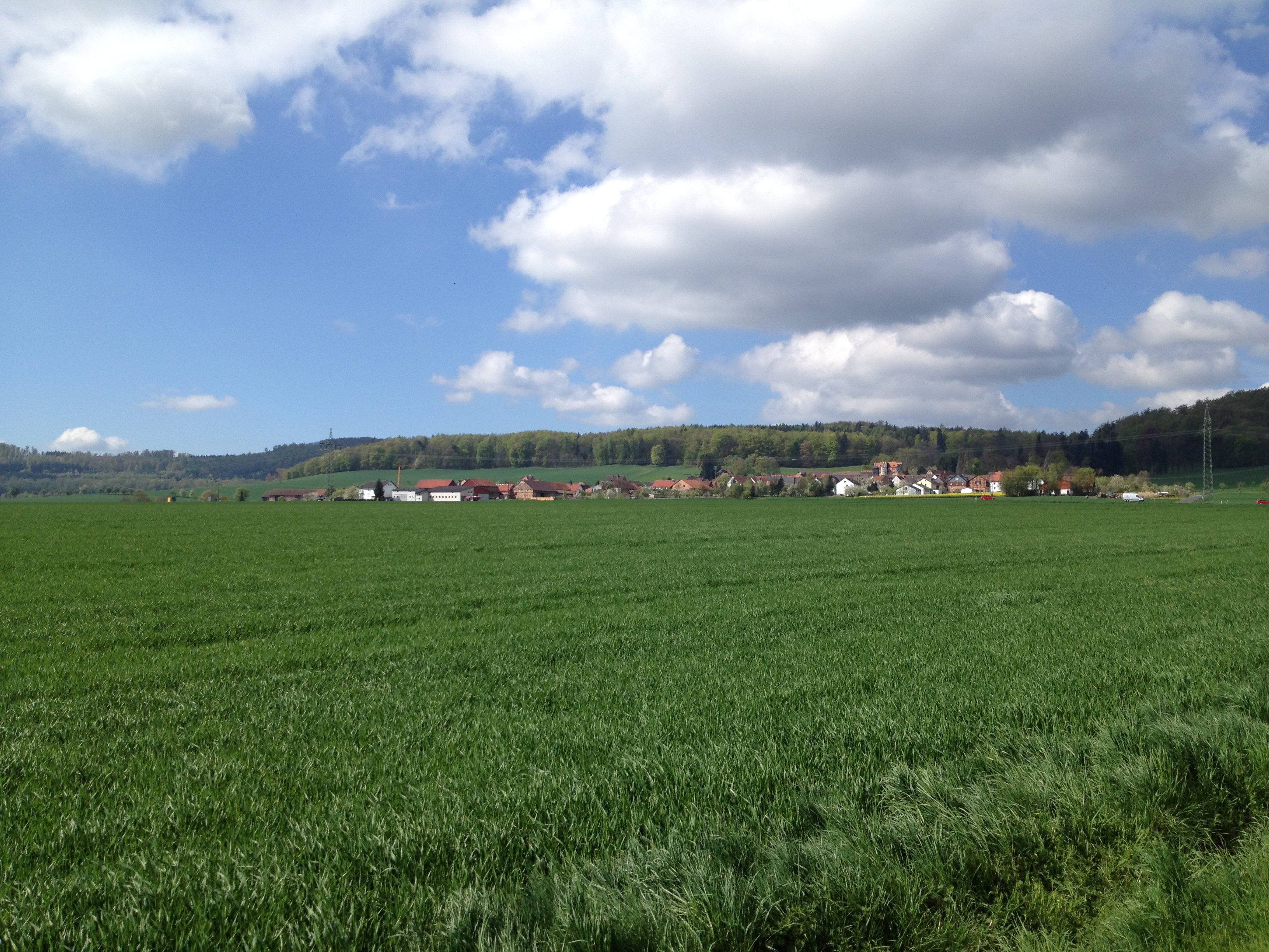 Blick auf Riede, einen Ortsteil von Bad Emstal, vom Sportplatz aus.